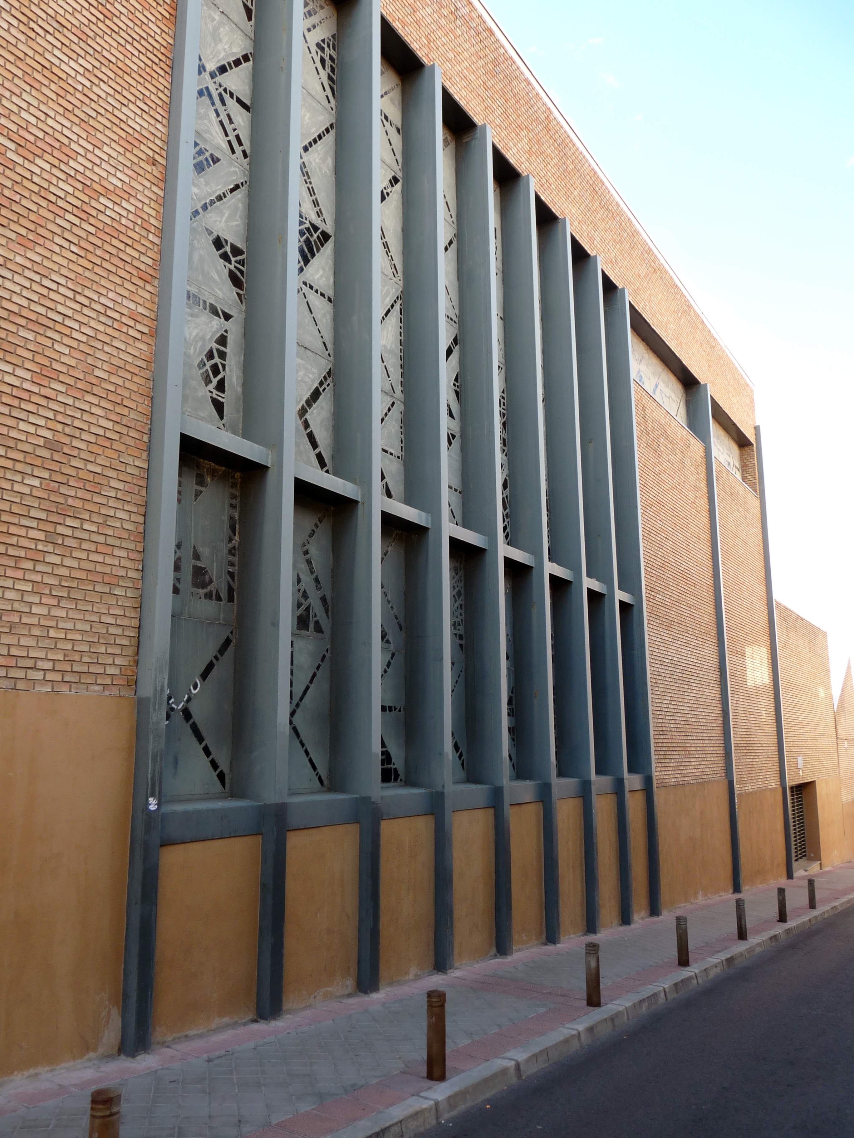 Parroquia de San Francisco Javier y San Luis Gonzaga, Madrid, España.